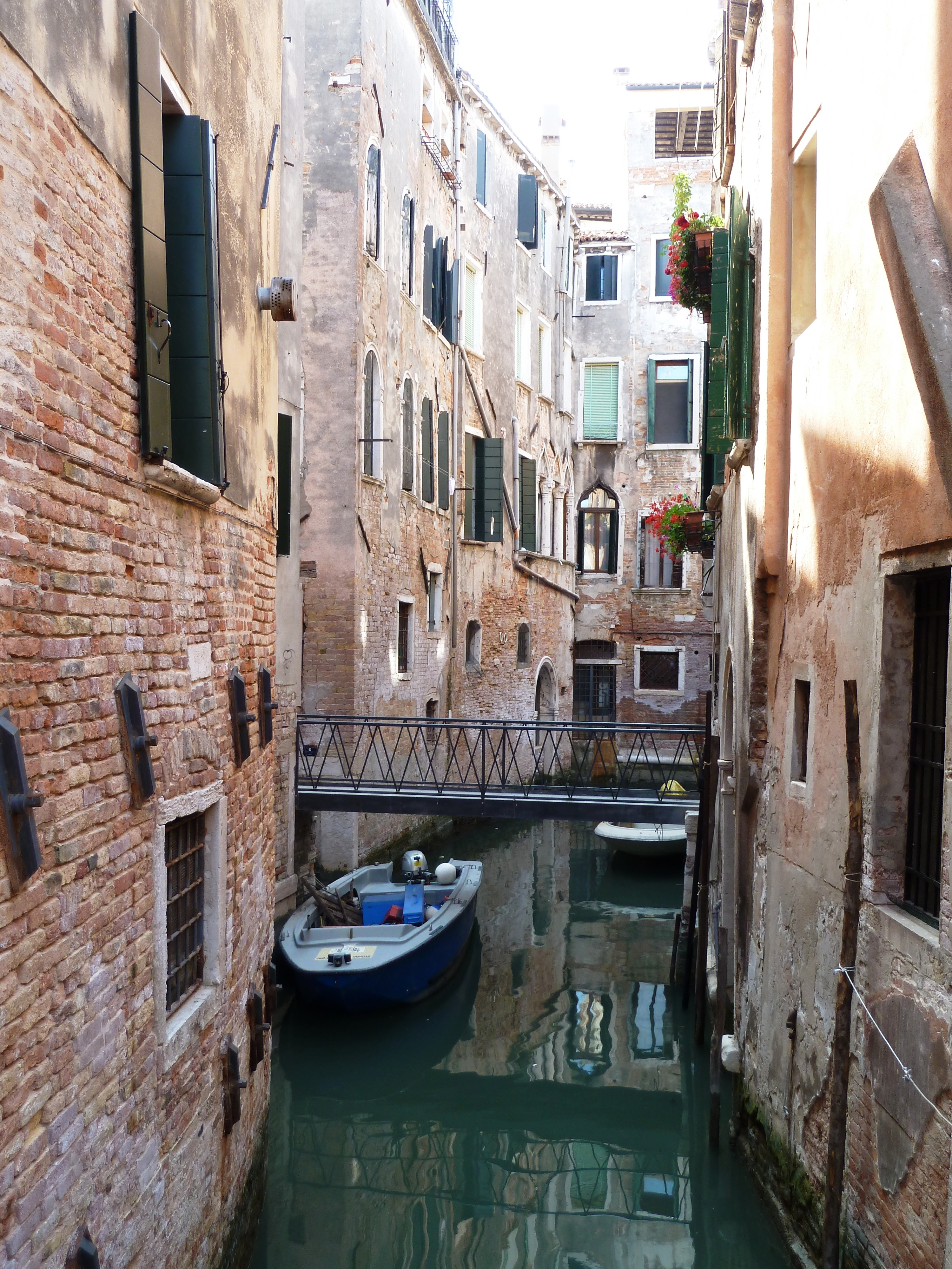 Rio del Piombo (Venice)